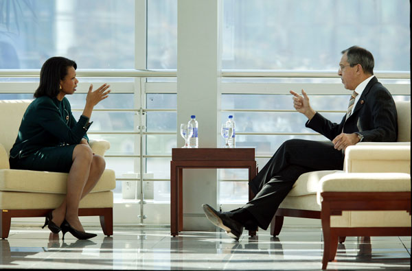 From US State Dept Website